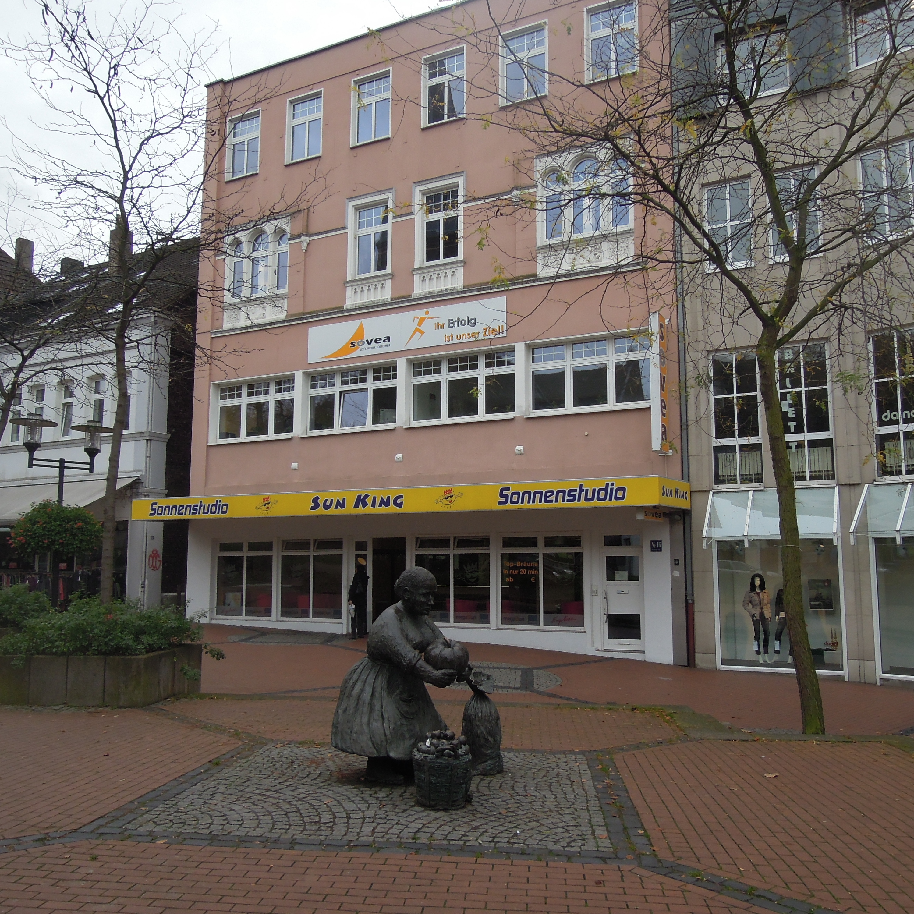 Lage des Stolpersteins Wittener Straße 16 in Castrop-Rauxel